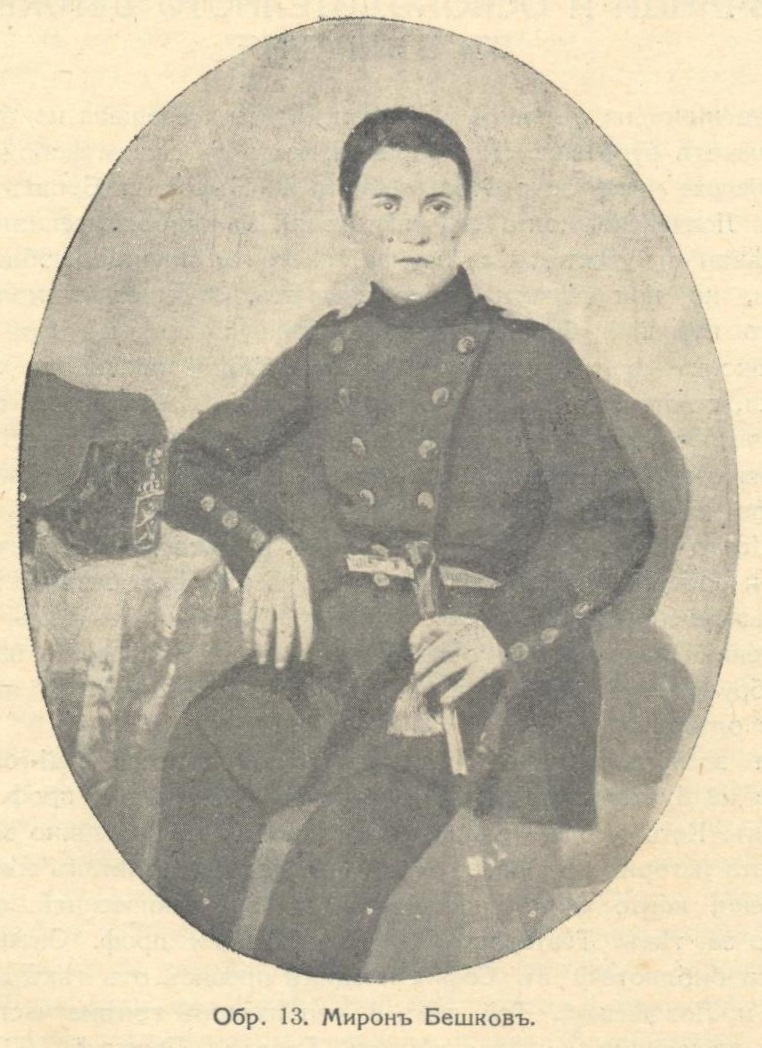 Ловеч и Ловчанско, книга 4, 1932, стр. 48 - Мирон Бешков